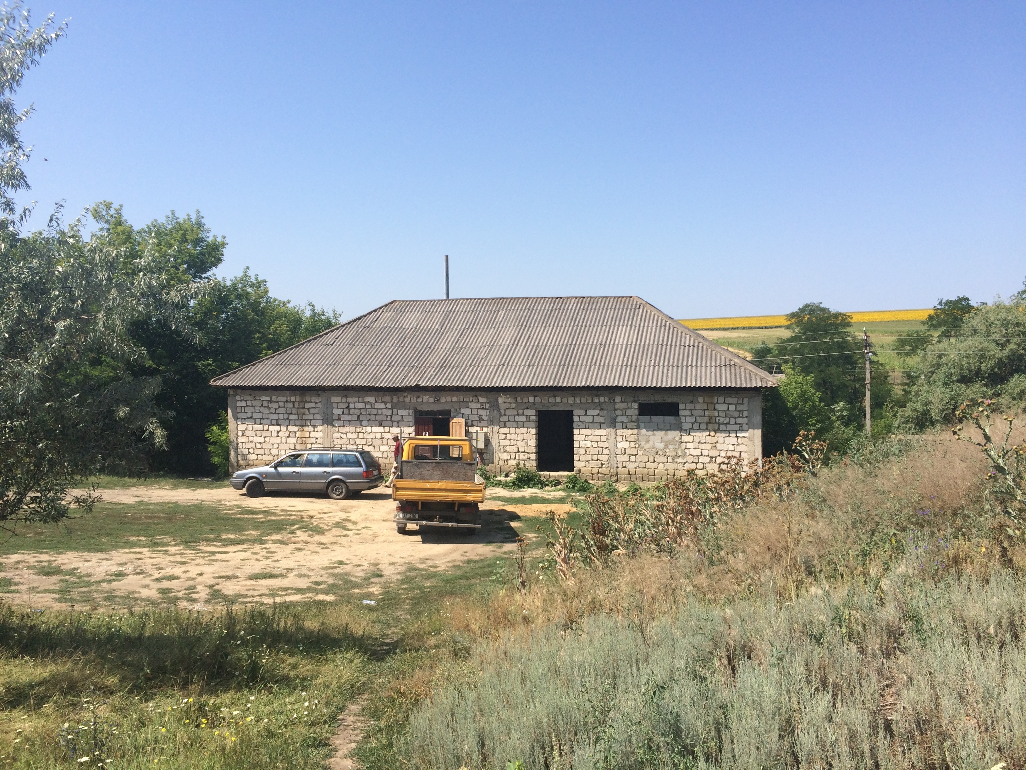 Магазин в с. Мисовка